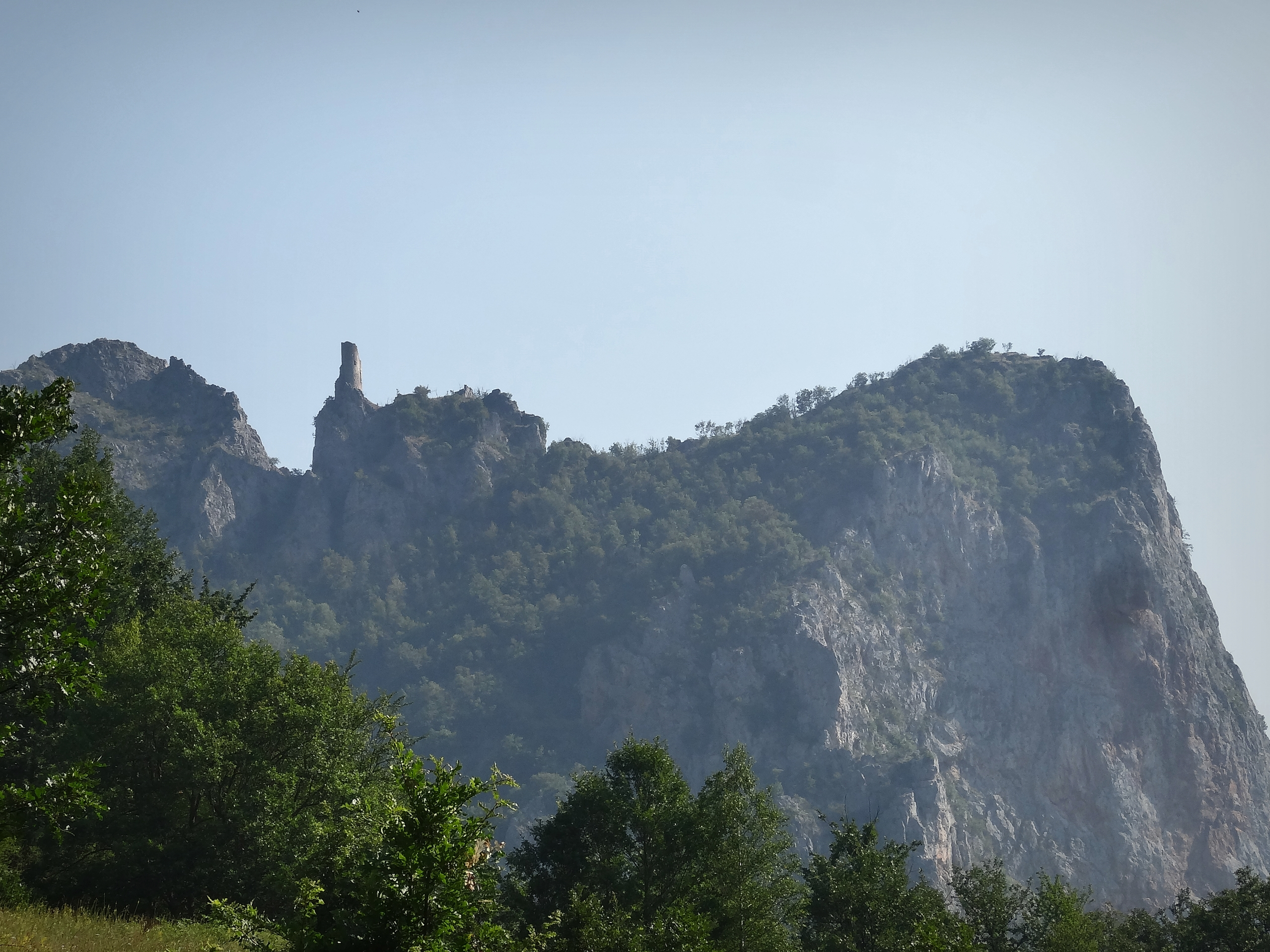 Stari grad Samobor, Novo Goražde This image was uploaded as part of Trace of Soul 2016.